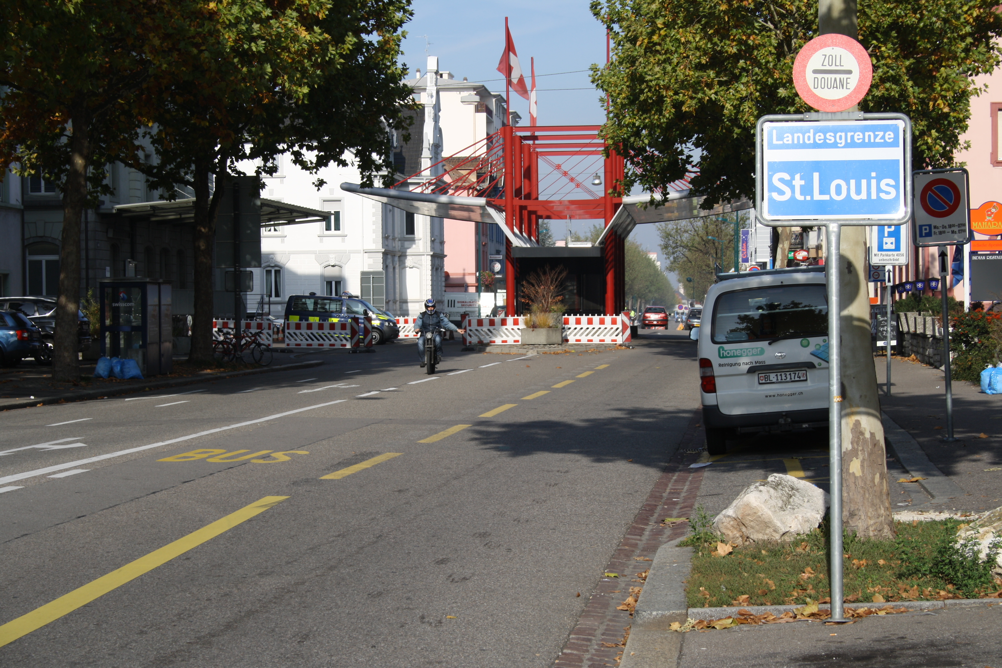 St.-Louis Grenzposten